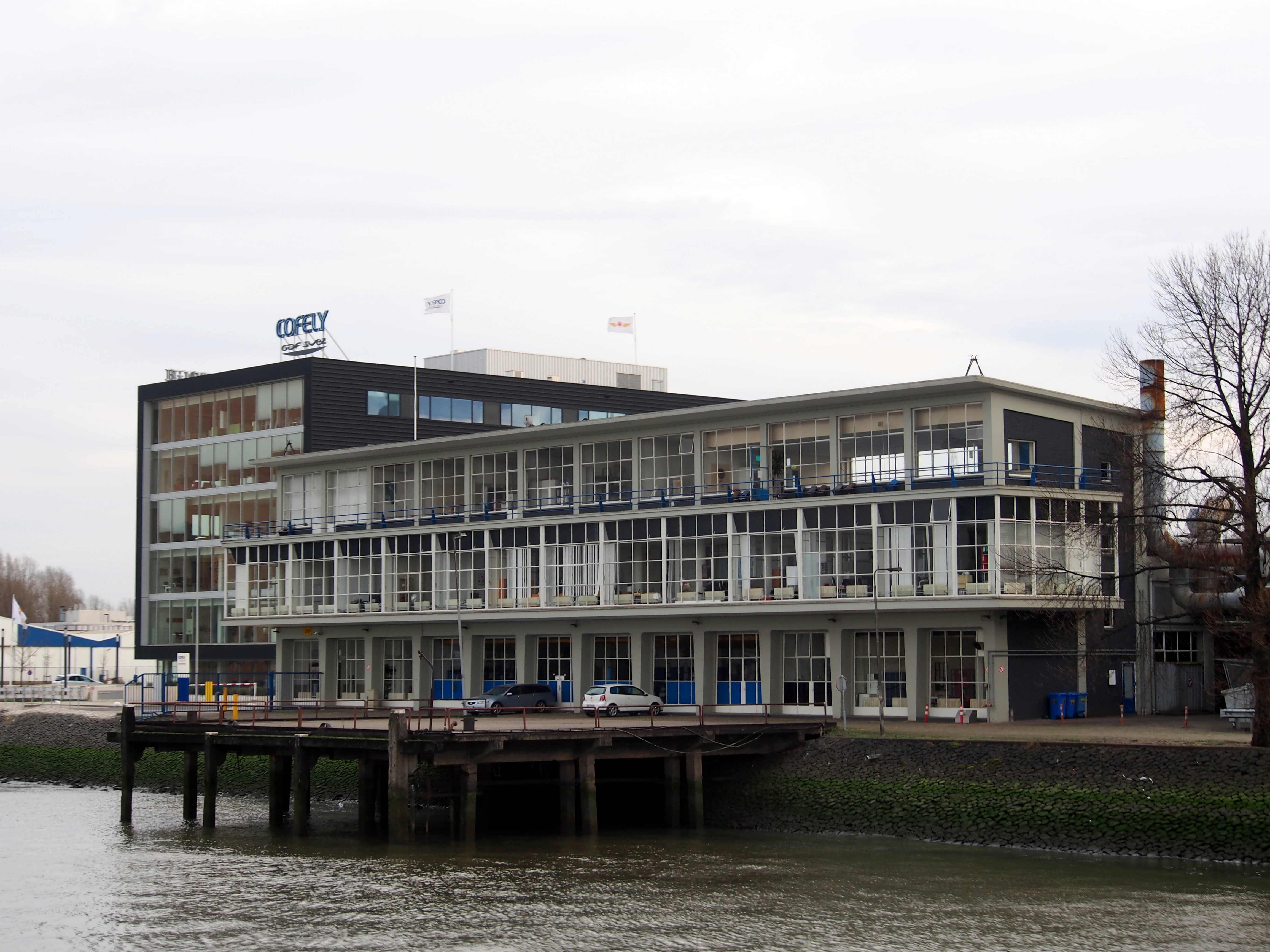 Clondalkin 50s gebouw aan de Maas.